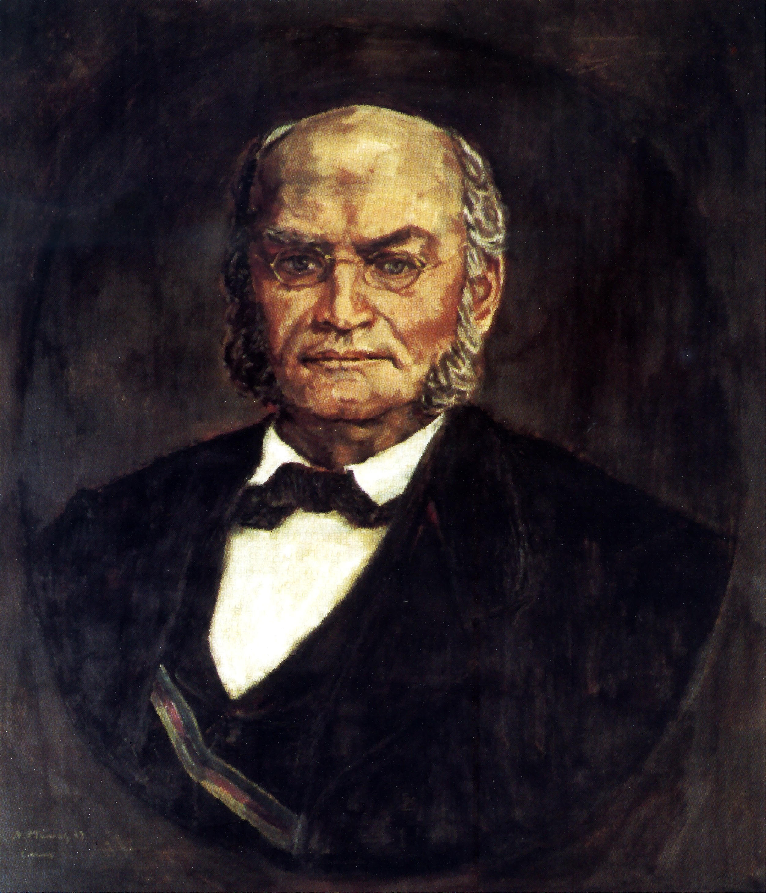 Ölgemälde im Kneipsaal der Landsmannschaft Teutonia Bonn